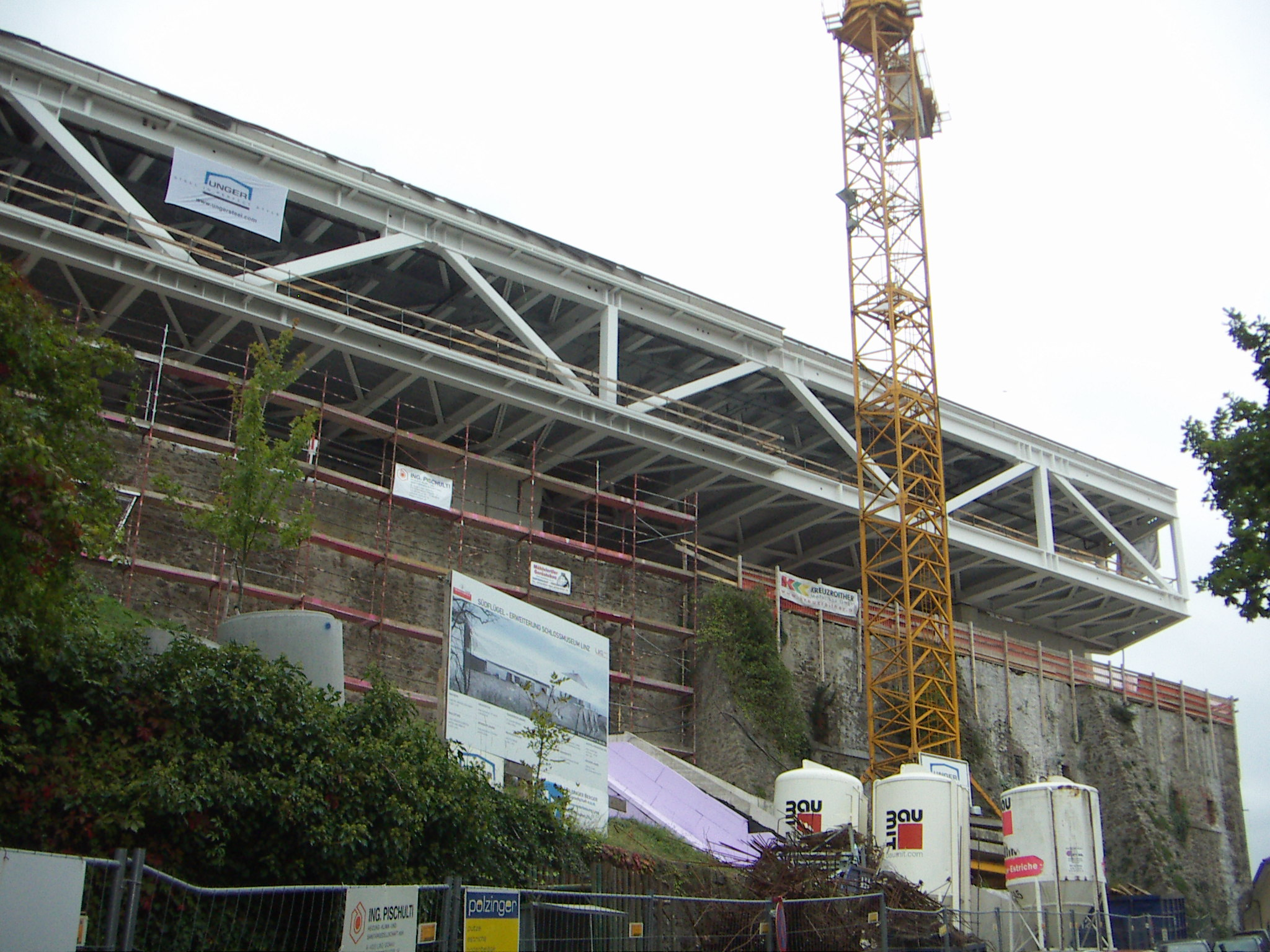 Linzer Schloss: Neubau des Südflügels. HoG-architektur Martin Emmerer und Hansjörg Luser